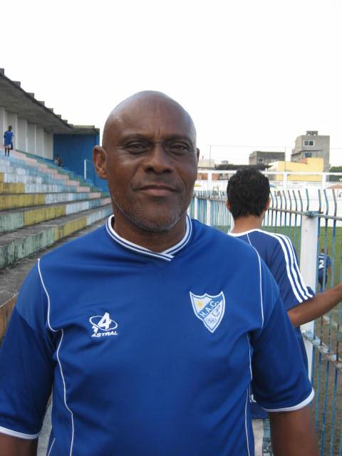 José Bento da Silva, o Bento Kojak, vice-presidente do Heliópolis Atlético Clube